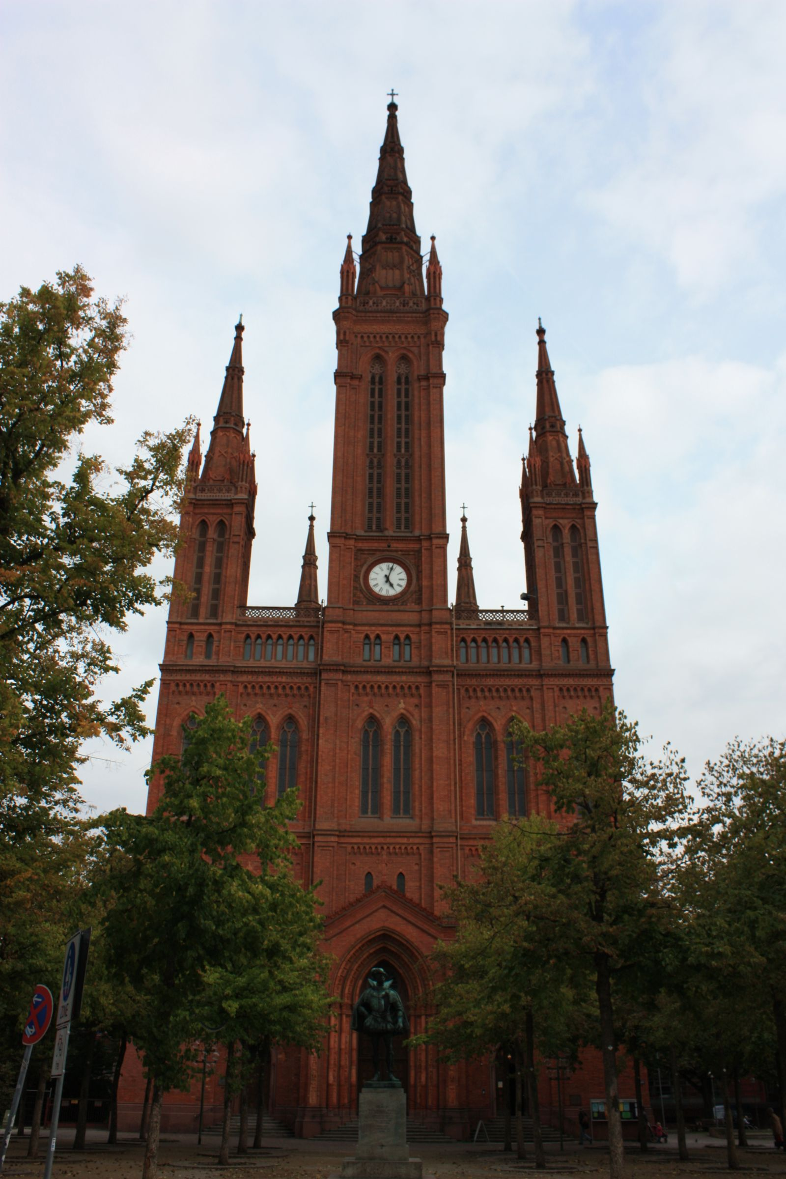 Portal der Marktkirche in Wiesbaden, Hessen nach Abschluss der Renovierung im Jahr 2008. Die Kirche wurde von Carl Boos zwischen 1853 und 1862 im Stil der Neugotik erbaut.